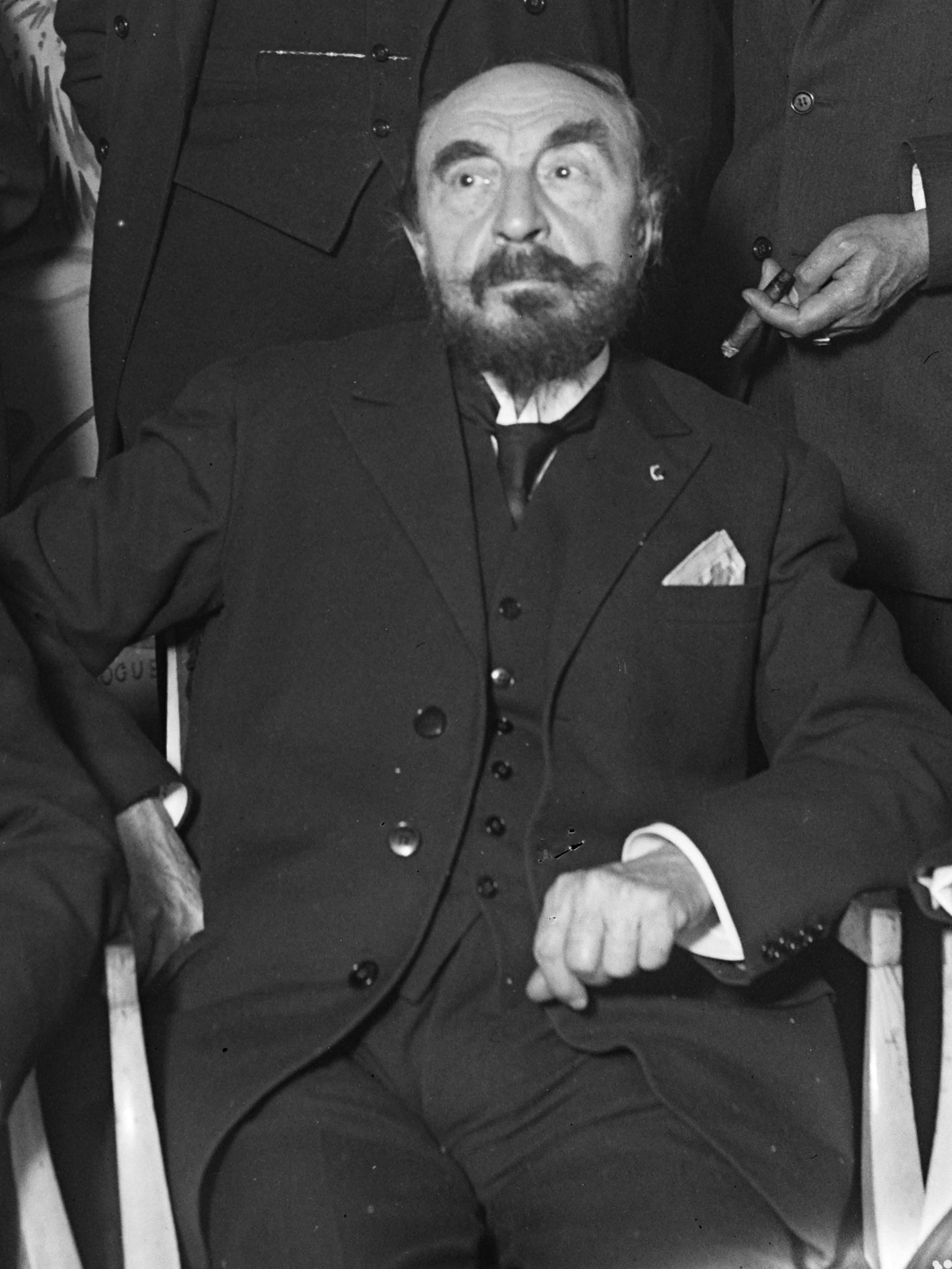 J.-H. Rosny aîné. Détail d'une photographie des membres de l'académie Goncourt, réunis au restaurant Drouant le 24 novembre 1926 (agence photographique Rol).